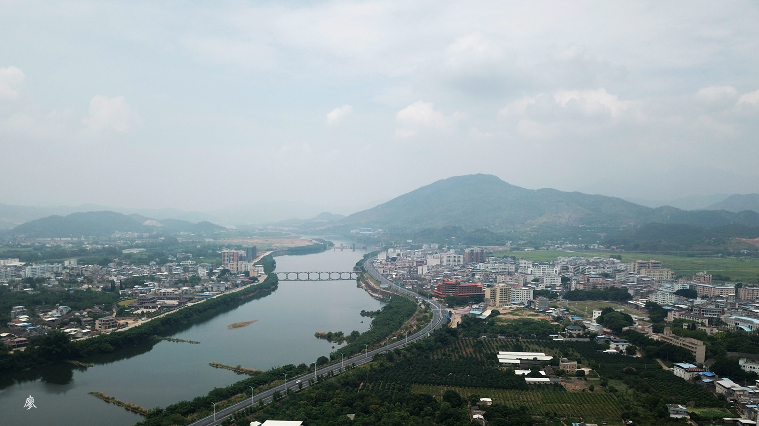 梅县丙村镇